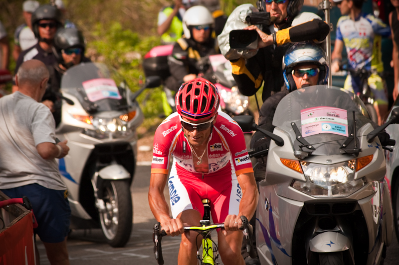 Fatiche da cronoscalata. 94° Giro d' Italia.